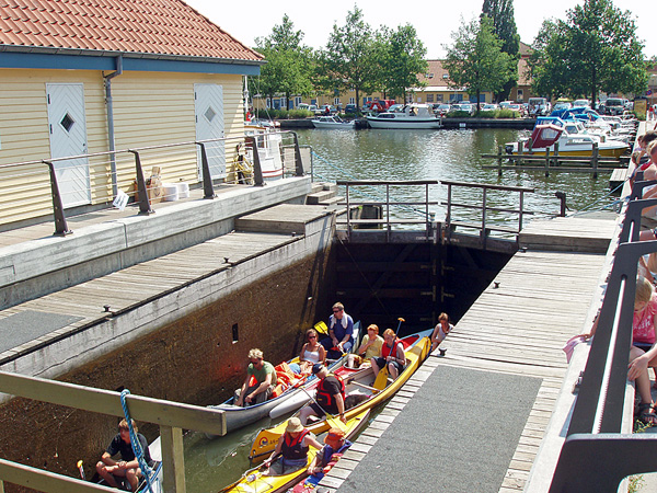 Kammerslusen på Gudenåen i Silkeborg